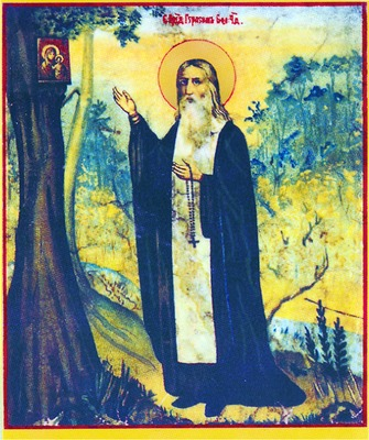 Прп. Герасим Болдинский у дуба, раскрашенная литография нач. XX века